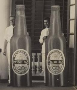 KITLV A643 - De heren Reedijk en Jong Baw naast een fles bier van Handelmaatschappij Van Romondt te Paramaribo